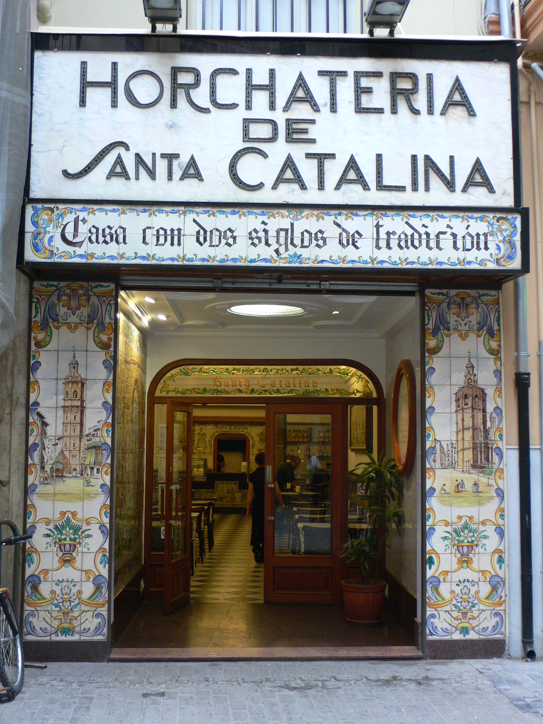 Fachada de la Horchateria de Santa Catalina en Valencia